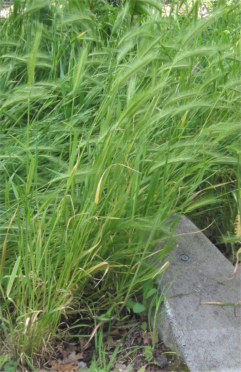 (Kruipertje) Hordeum murinum plant